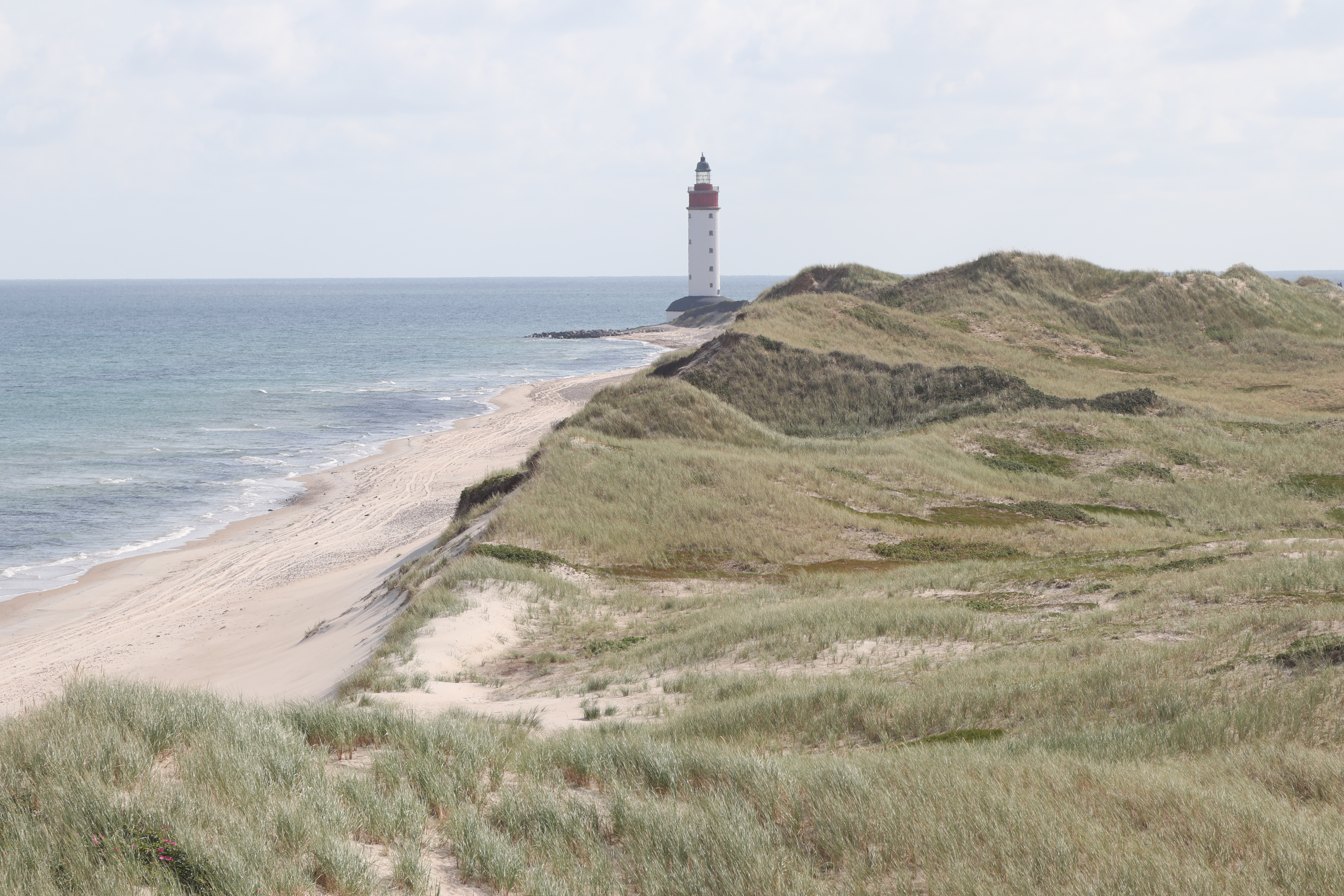 Anholt Nordstrand og fyret